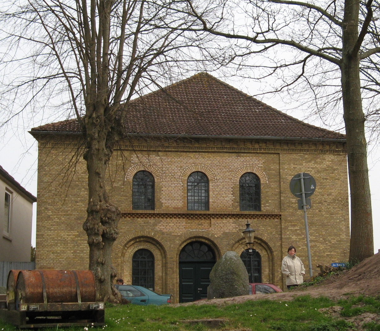 Old Synagogue Friedrichstadt Author: Dirk Ingo Franke